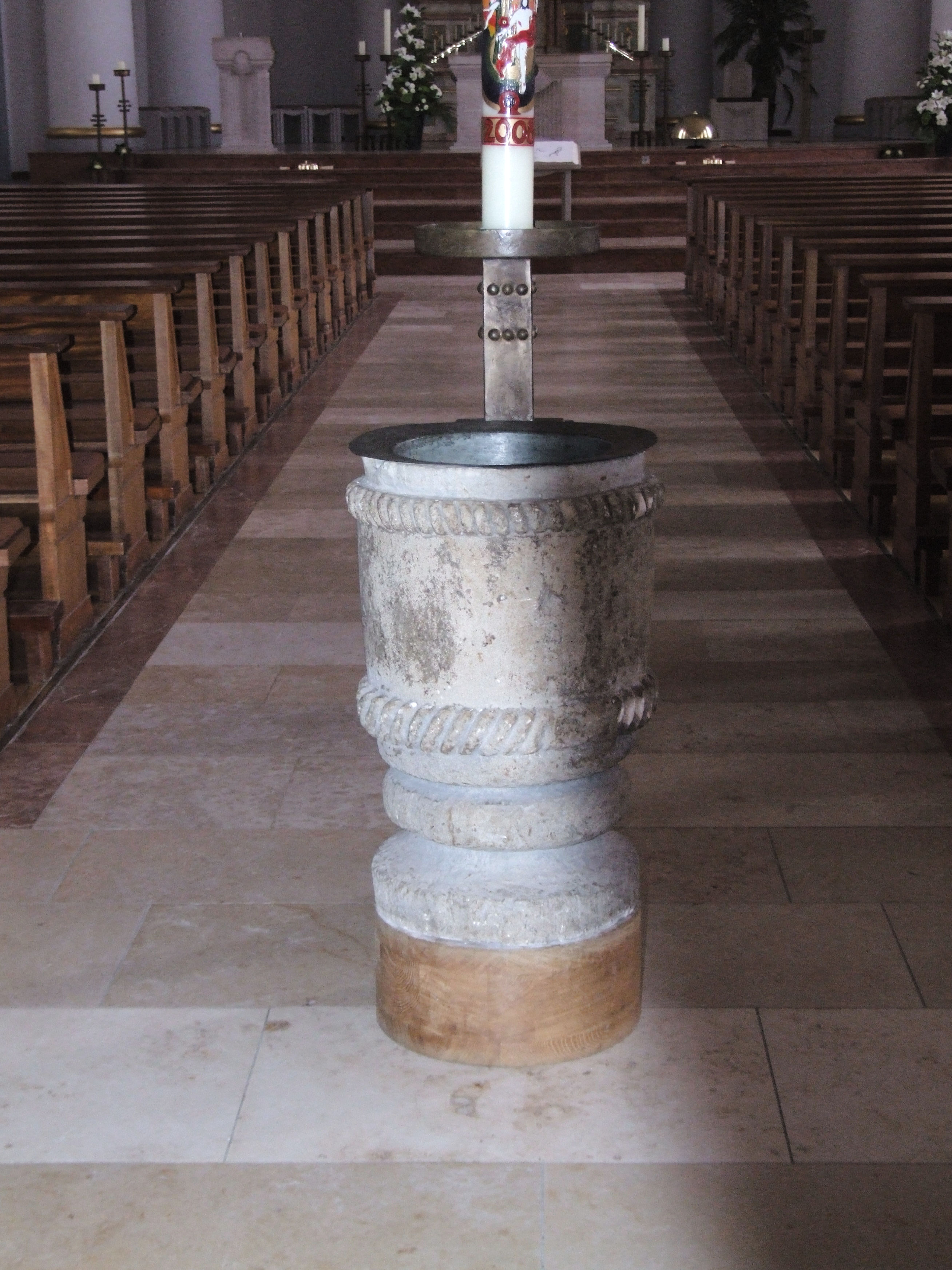 Pfarrkirche St. Vitus in Löningen